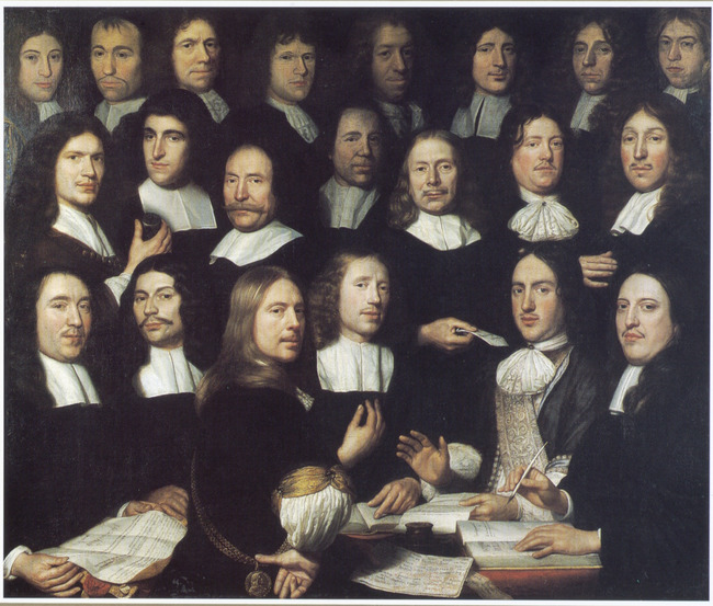 De Munters van de Munt van Holland te Dordrecht.